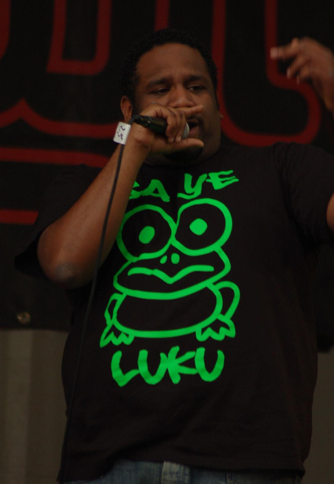 Olliçio Locadia (Amsterdam, 1982), beter bekend als Willie Wartaal is een Antilliaanse rapper, die lid is van de formatie De Jeugd van Tegenwoordig